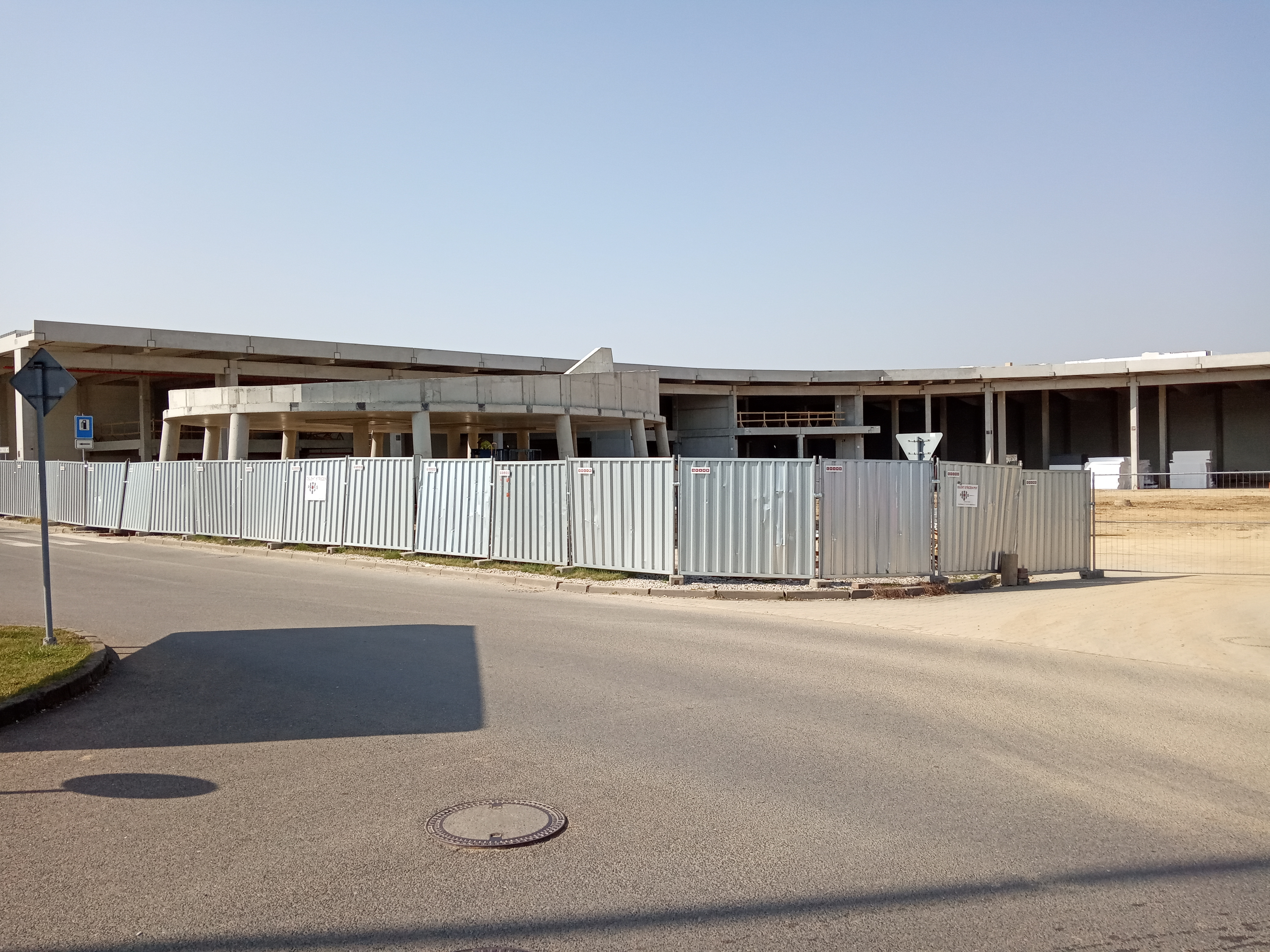 Čestlice - stavba Strip Mall Spektrum